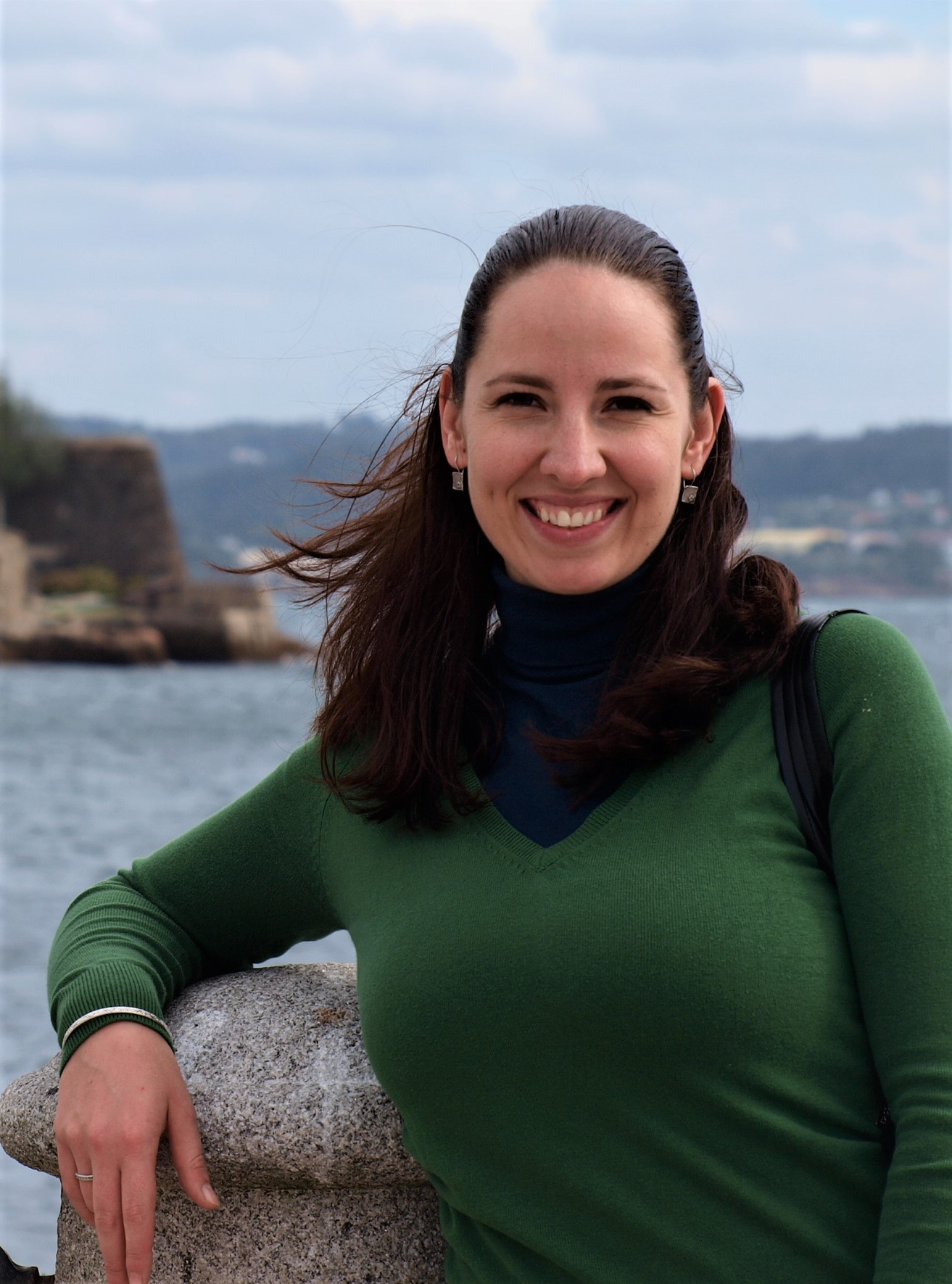 Sopranistka Olga Vít Krumpholzová